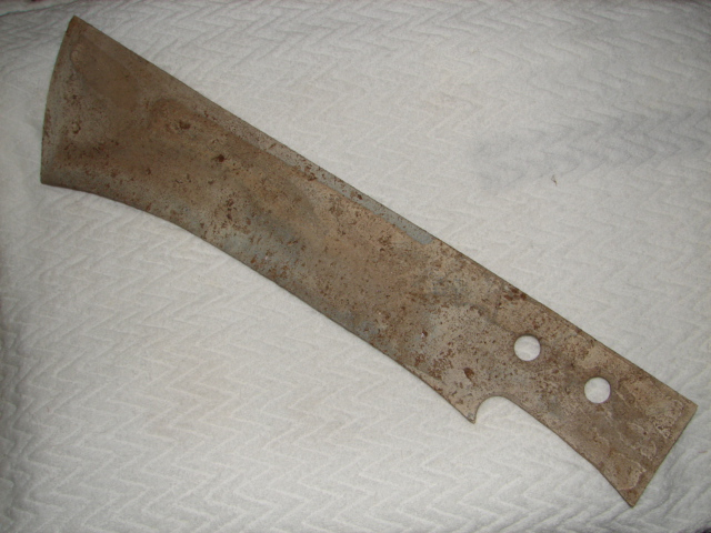 三星堆文化-年代約4800至2200年。 三星堆文化-小件配飾品.有數百種的造形.玉牙璋.玉琰.玉刀.玉鏟.魚牙璋.Ｃ形龍斧鋤器.猪龍斧鋤器.﹝玉梟.玉鷹斧鋤器﹞.面具.異形獸斧鋤器.玉蟬複合體等。 此器質化晶變‧次晶增生未受人工拋光打磨、 保留原有風化.、生坑未盤玩，造形特別‧曲線流暢.雕工傳神‧創意佳。 A jade zhang from the Sanxingdui culture, c.2800–200 BC [sic: the Sanxingdui site actually dates to c. 1200 BC].